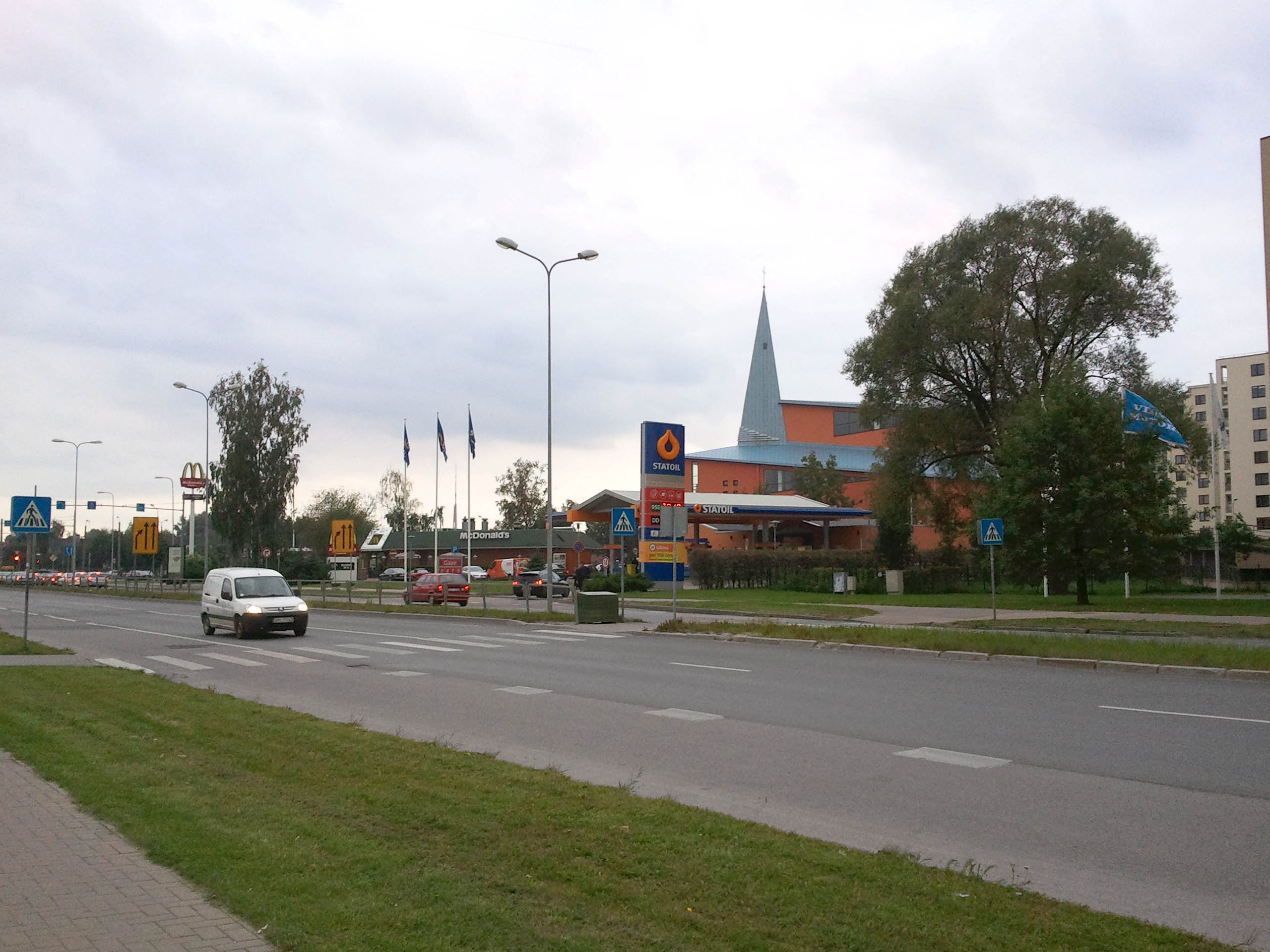 Purvciems